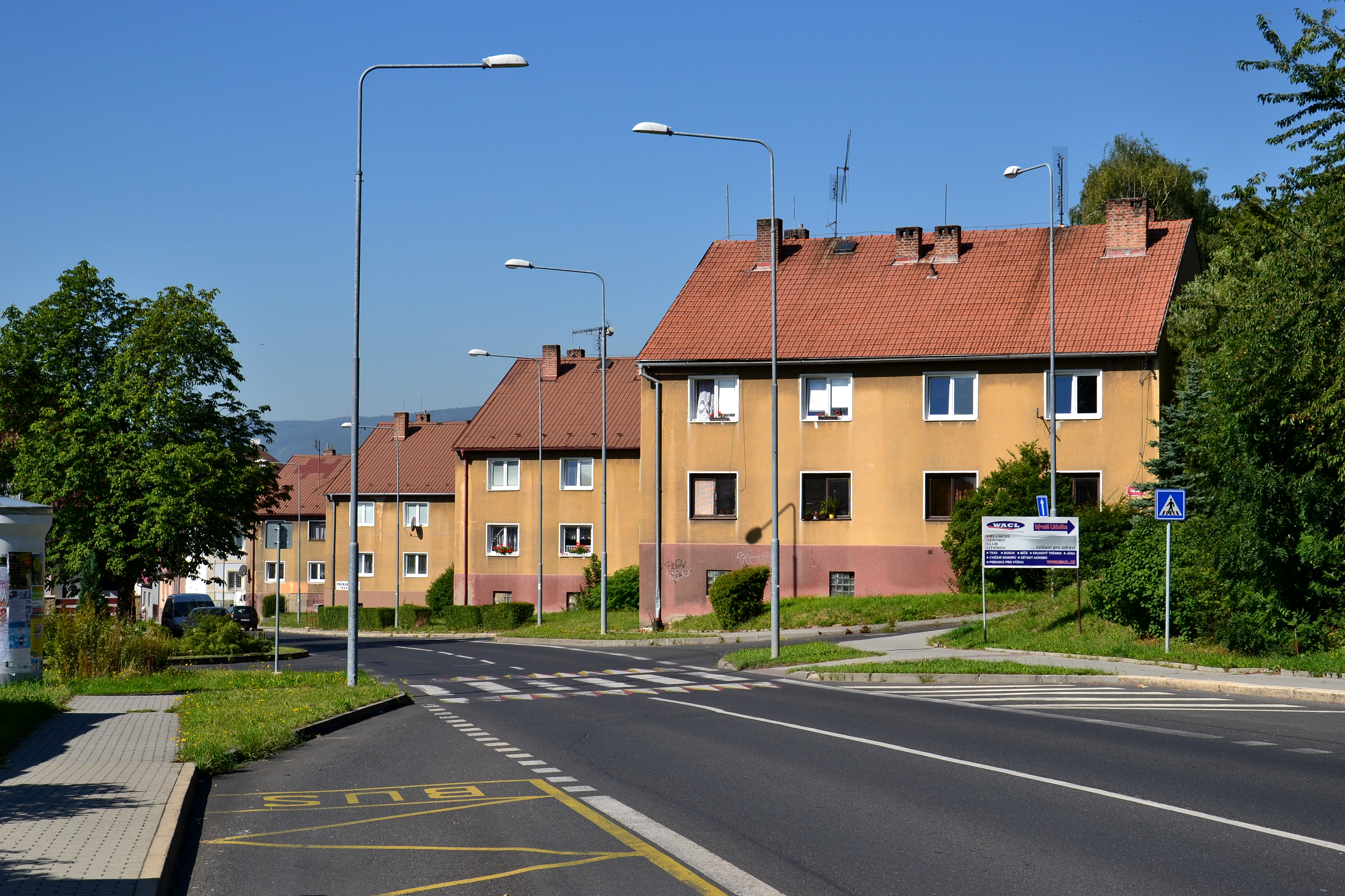 Podkrušnohorská ulice